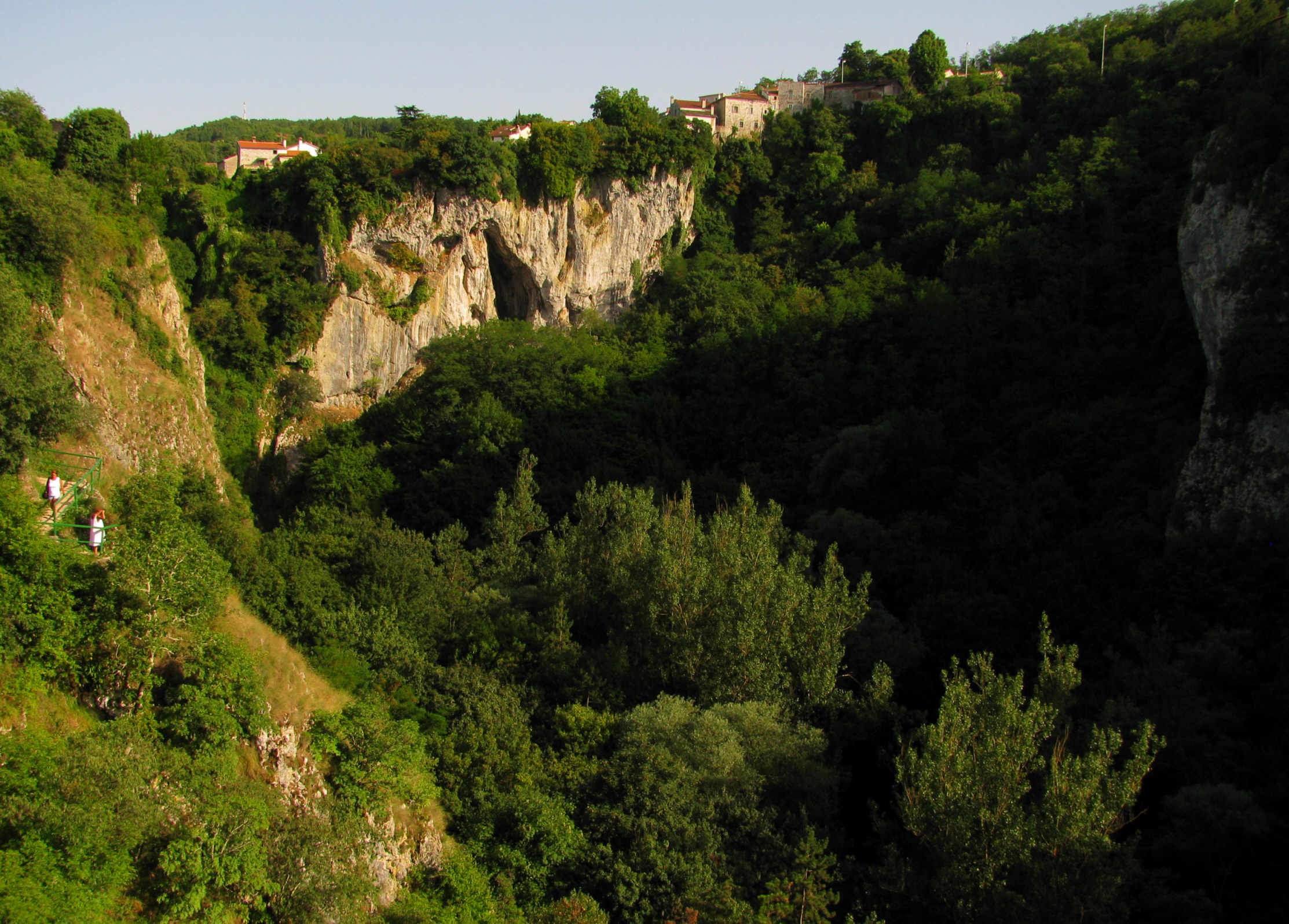 Fojba-Schlucht in Pazin, Kroatien